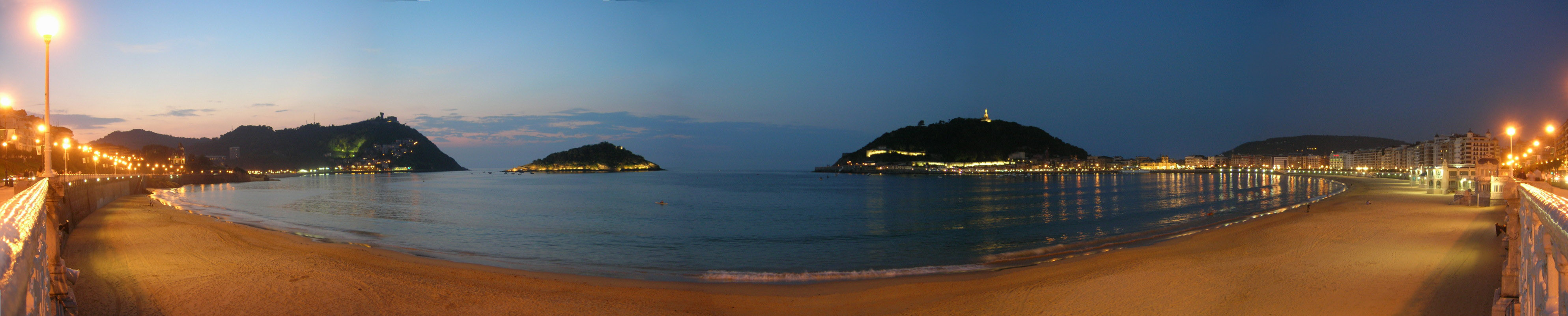 Panorama de la platja de la Concha de Donostia.